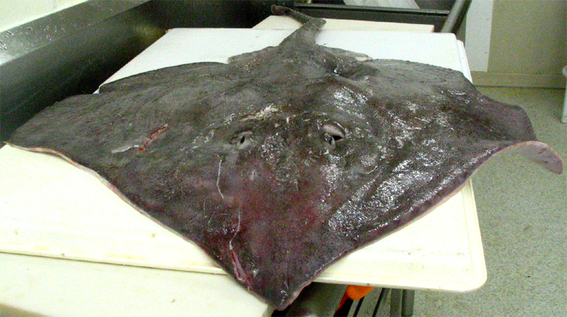 Raie à queue épineuse dans une poissonnerie (La Poissonniere) aux Îles-de-la-Madeleine (2006).